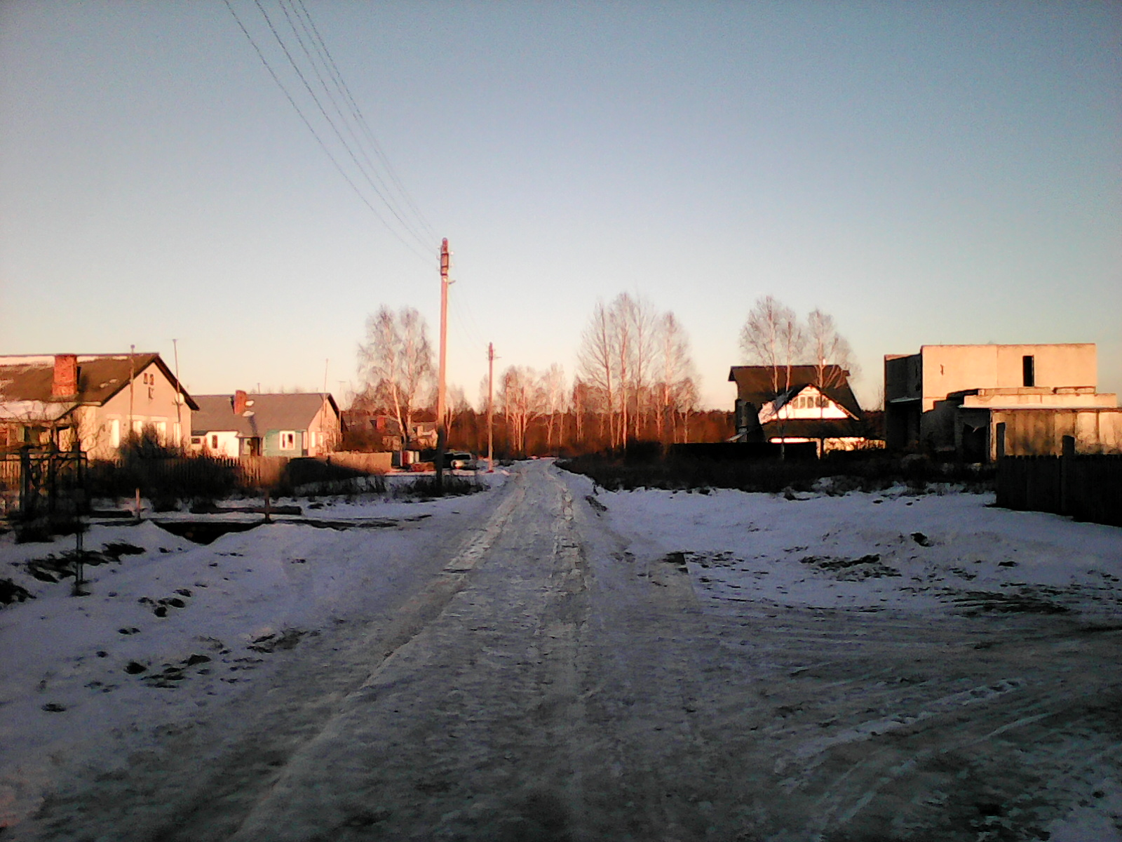 Деревня Аксениха, центр улицы Молодёжной